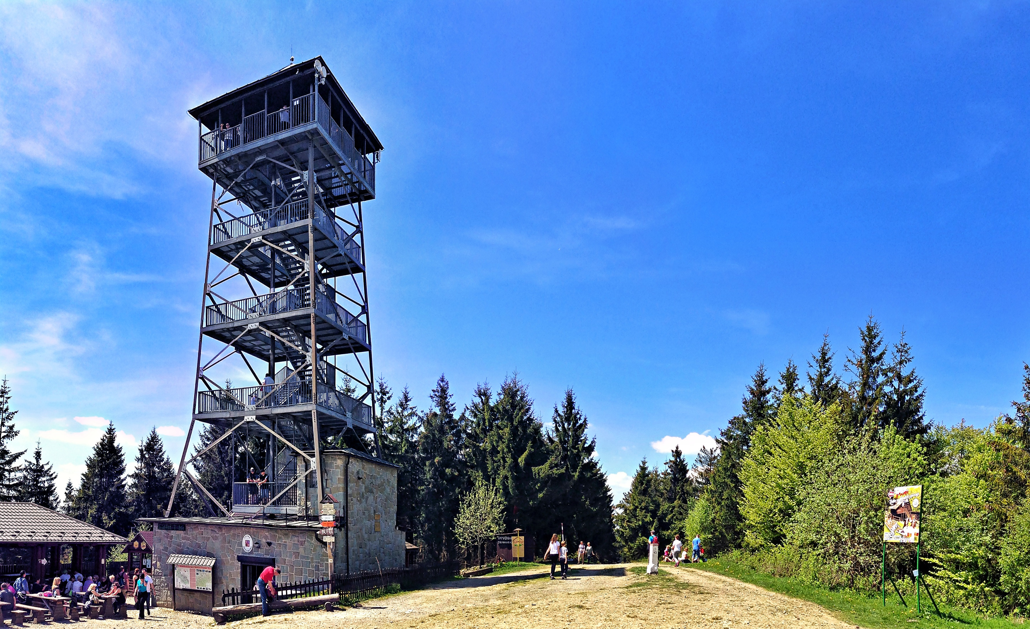 Vrchol Velké Čantoryje (995 m) s rozhlednou.